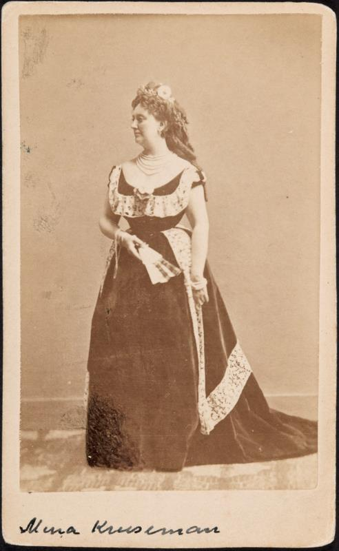 Portret van Mina Krüseman als Koningin Louise in Vorstenschool (1875)